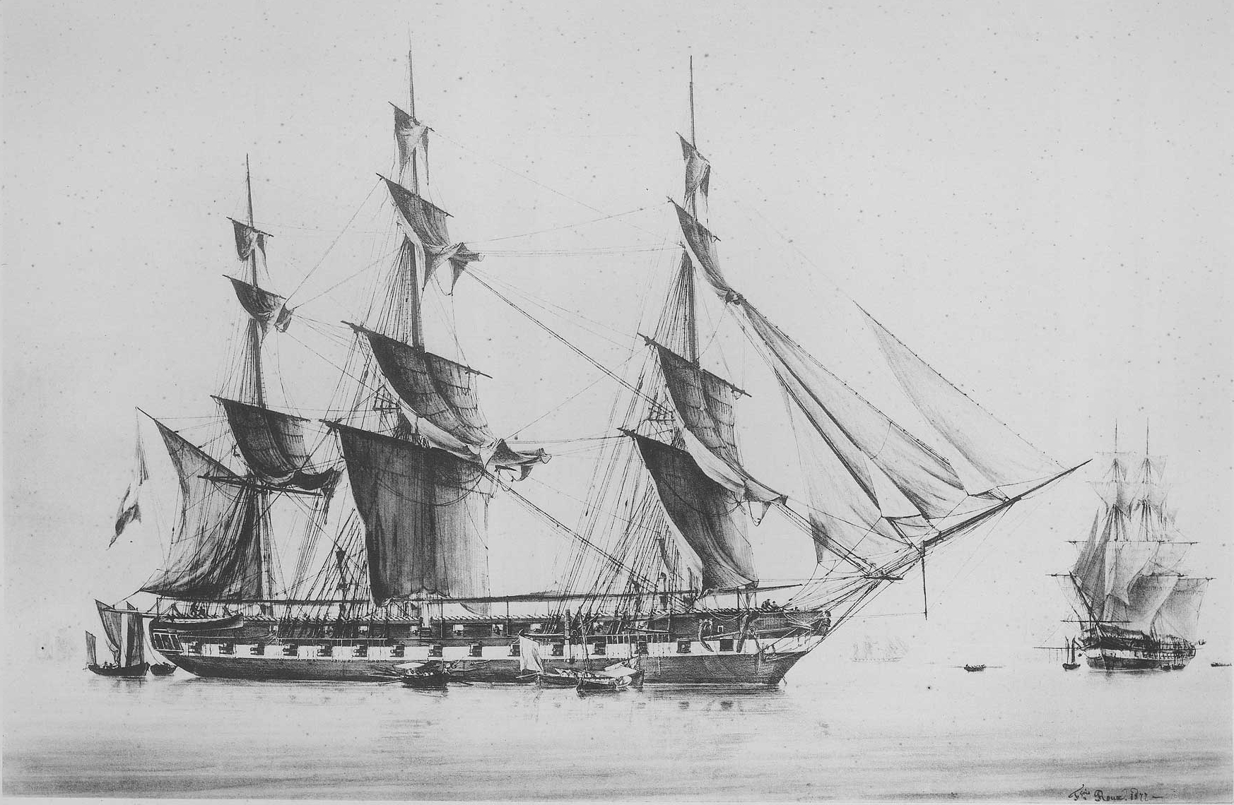 Frigate Artémise (1828)